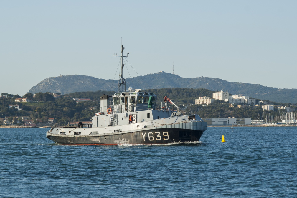 Le remorqueur Giens de la Marine Nationale rentrant dans le port militaire de Toulon